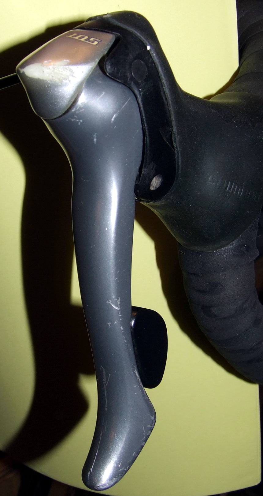 Klamkomanetka Shimano 105 Fot. Bartosz Senderek